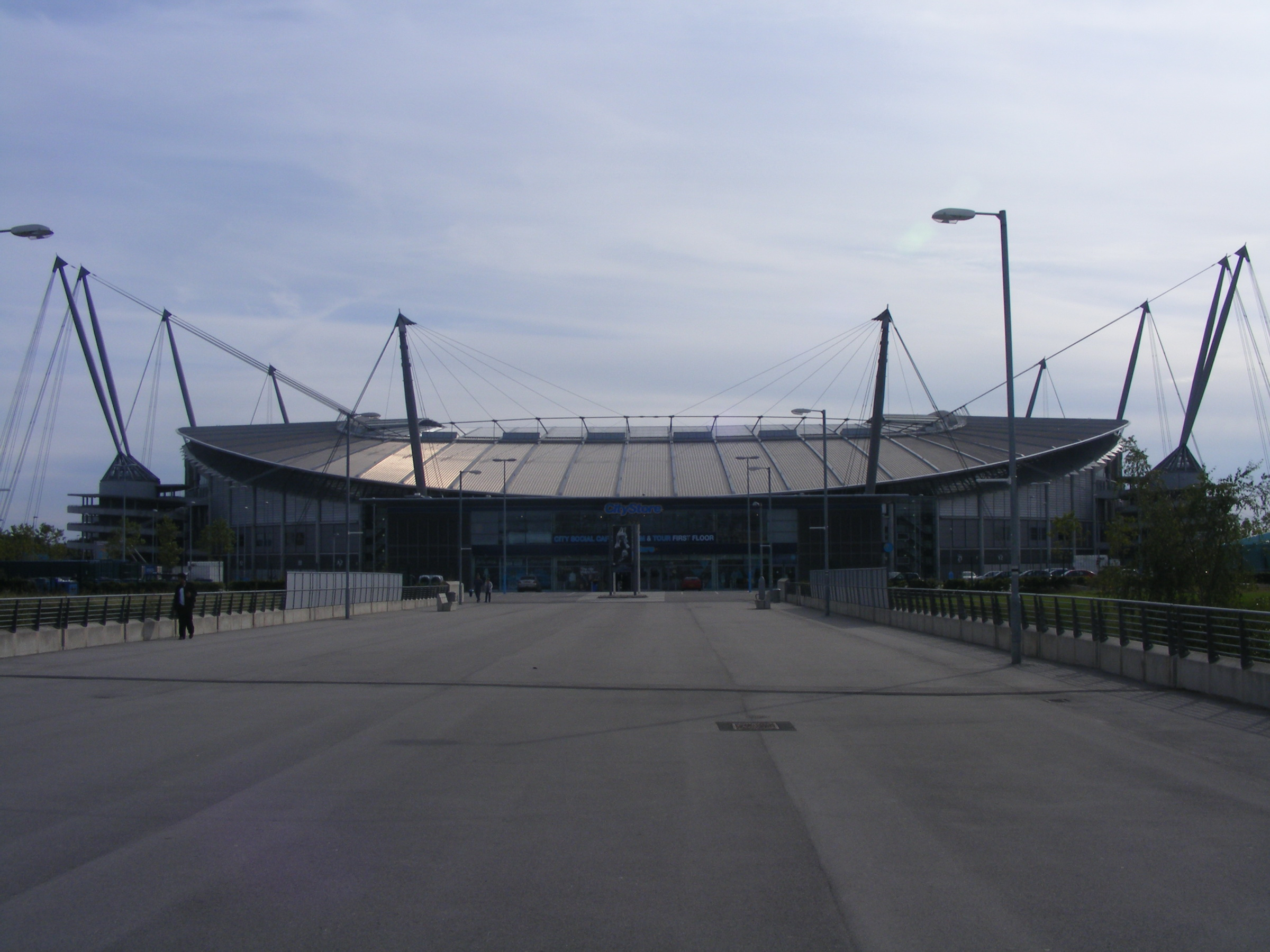 Etihad Stadium, Manchester, England